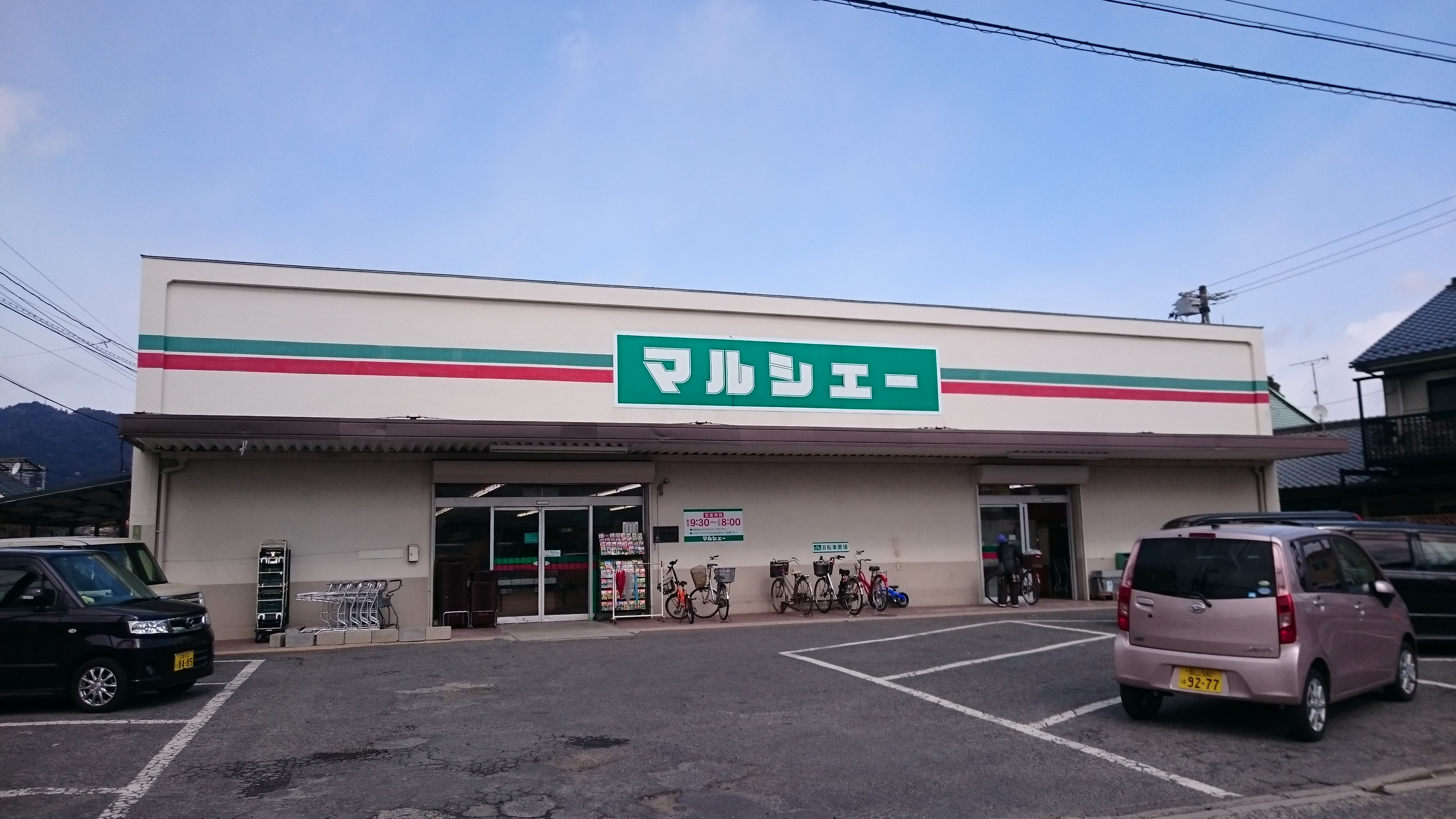 マルシェー川内店の画像です。